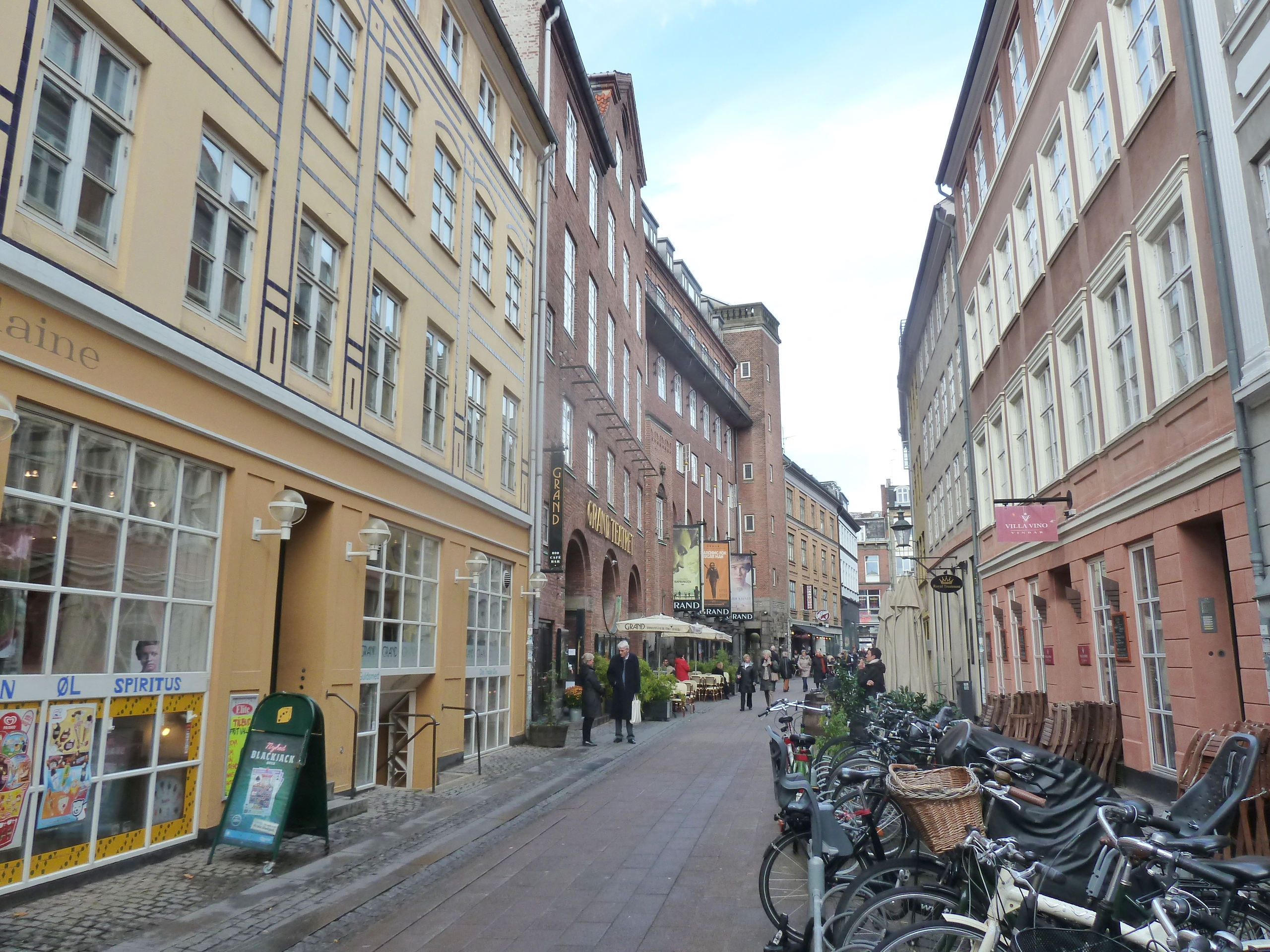 The street Mikkel Bryggers Gade in Indre By in Copenhagen.